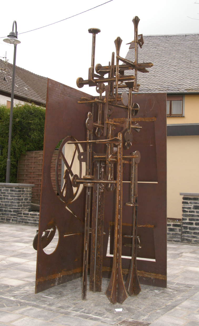 Bild des Denkmals auf dem Dorfplatz